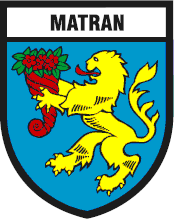 Wappen von Matran Kanton Freiburg Schweiz